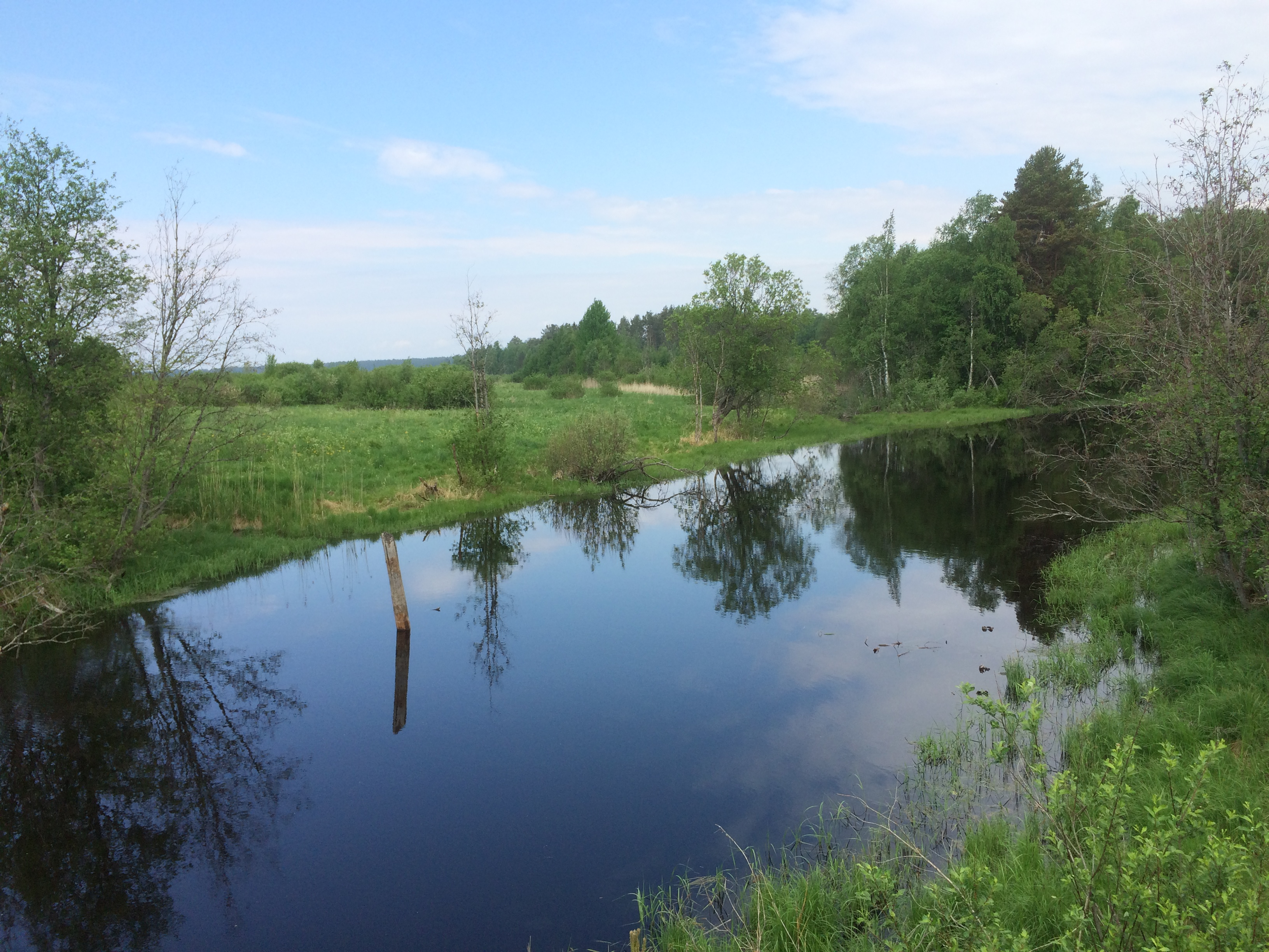 Кирккойоки